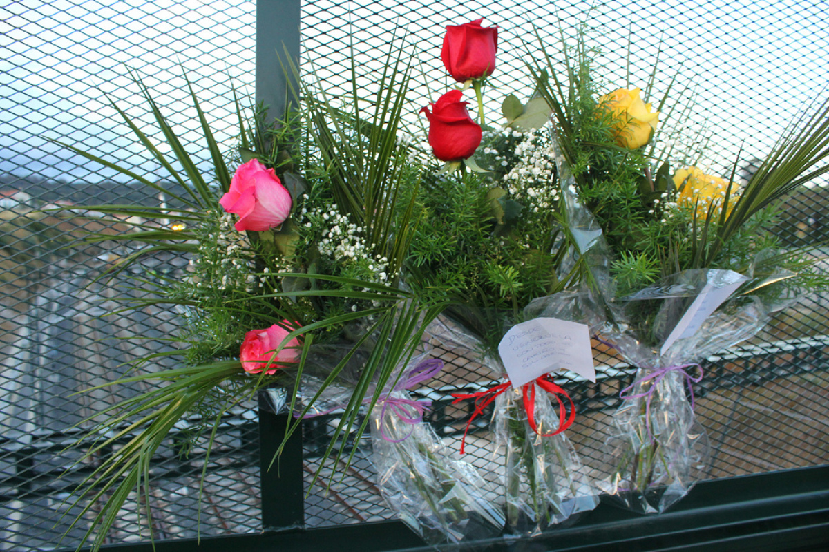 Flores deixadas no lugar do accidente ferroviario de Angrois.